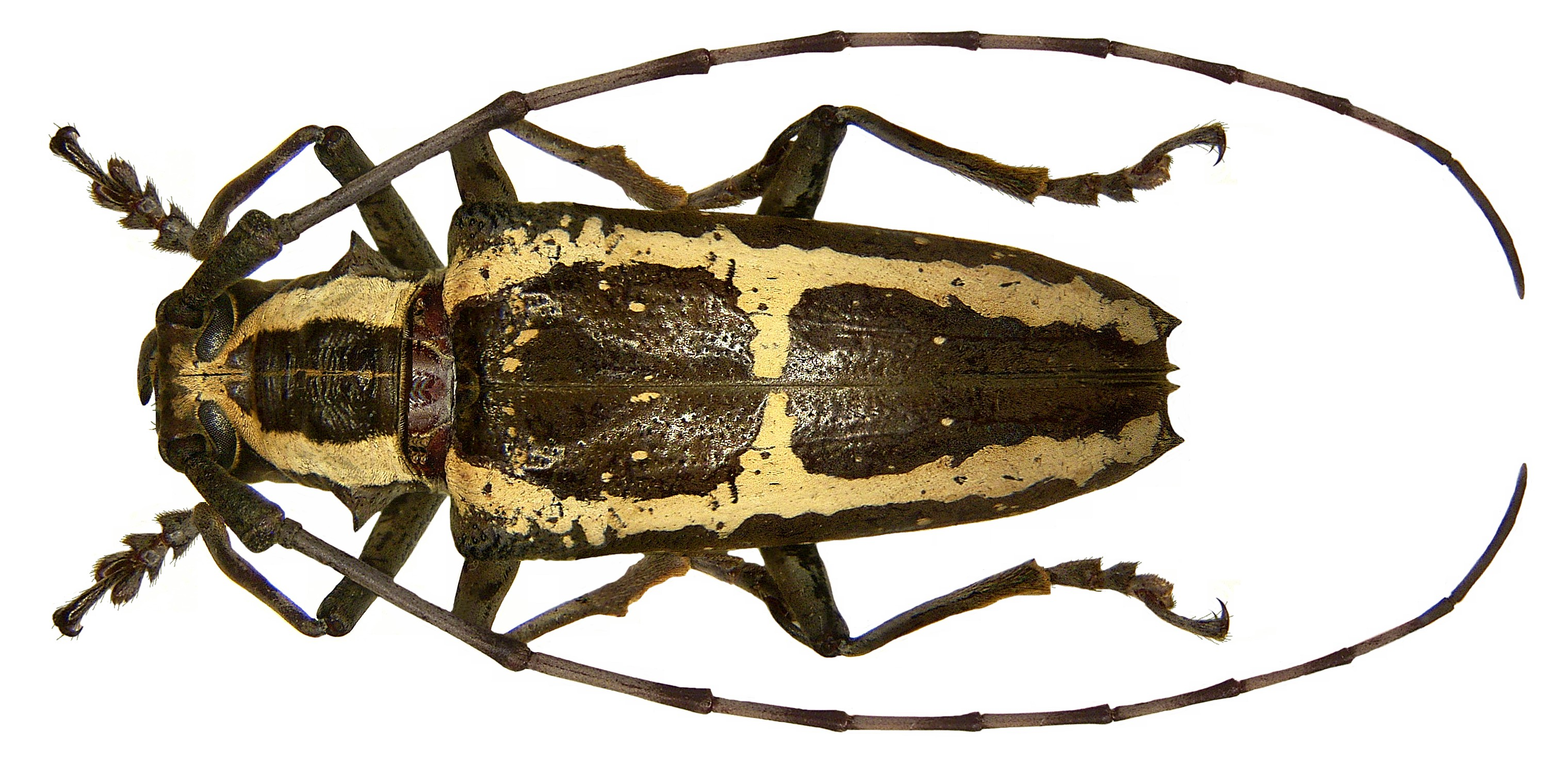 Familie: Cerambycidae Größe: 31 mm Fundort: Philippinen, Leyte, Balocane leg. 2006; det. A.Skale Foto: U.Schmidt, 2008